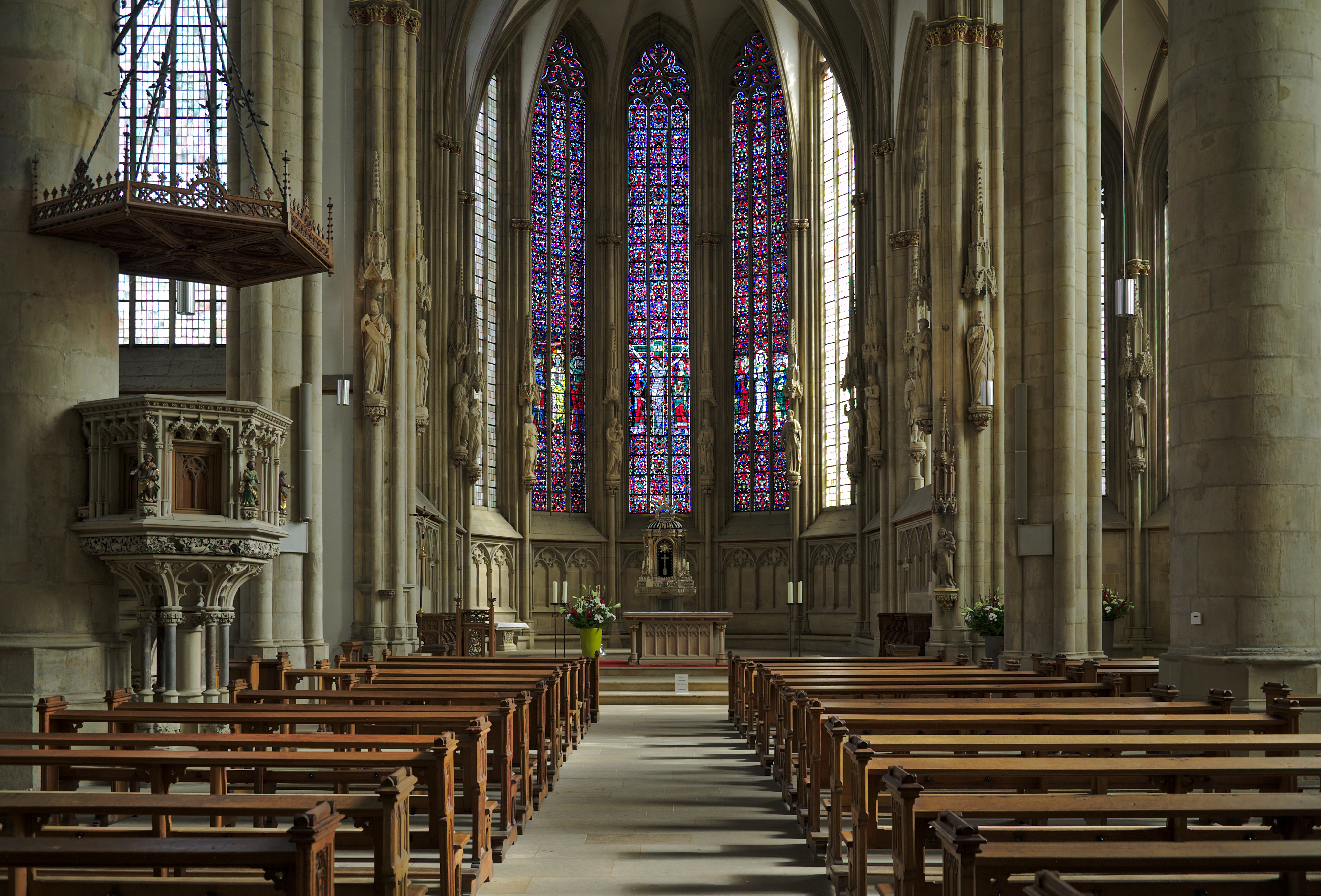 Innenraum der Lambertikirche in Münster.